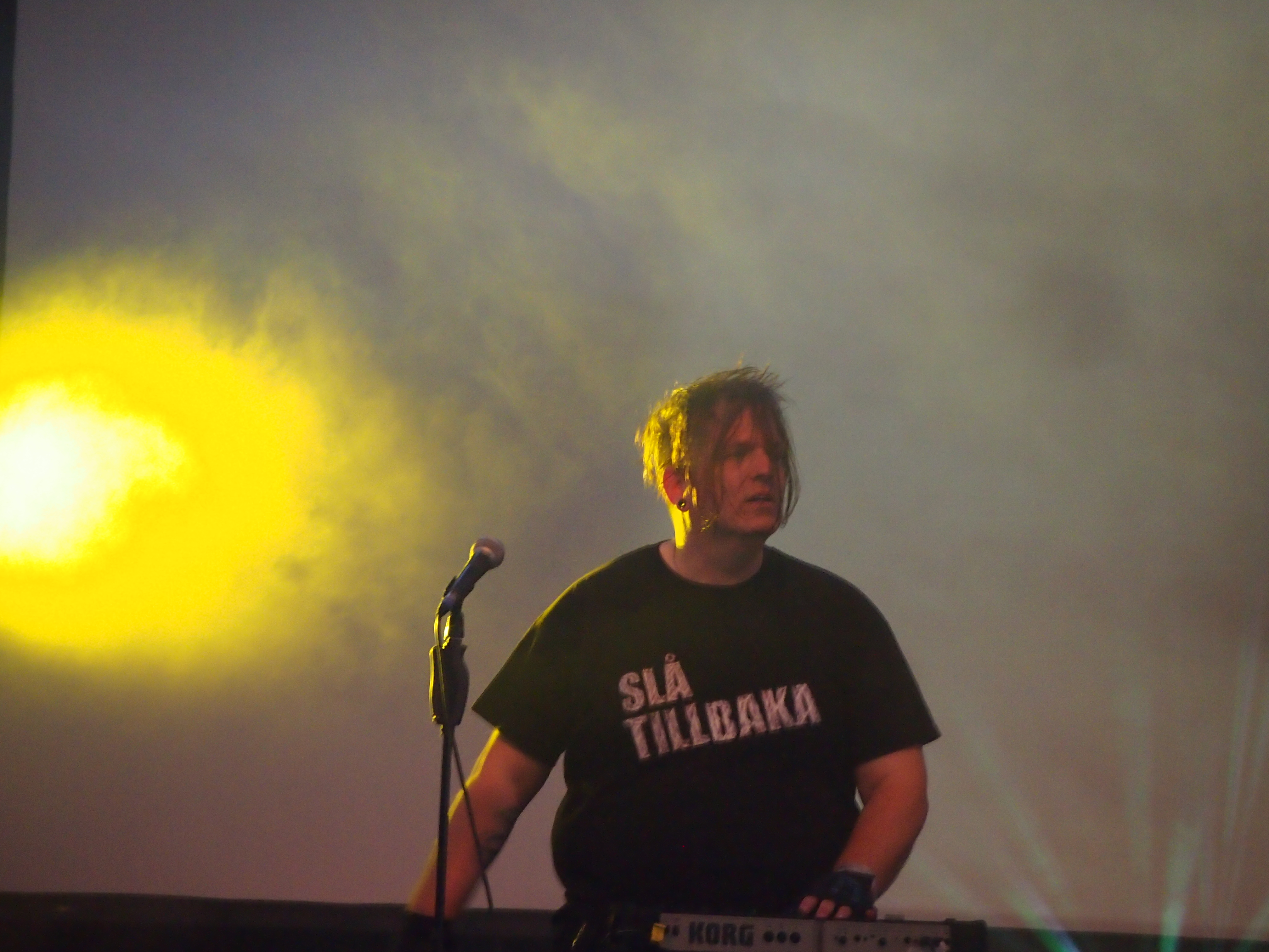 xotox auf dem E-Tropolis-Festival 2014 Festivalsommer This photo was created with the support of donations to Wikimedia Deutschland in the context of the CPB project "Festival Summer". This file is made available under the Creative Commons CC0 1.0 Universal Public Domain Dedication. The person who associated a work with this deed has dedicated the work to the public domain by waiving all of their rights to the work worldwide under copyright law, including all related and neighboring rights, to the extent allowed by law. You can copy, modify, distribute and perform the work, even for commercial purposes, all without asking permission. Thomas Springer Personality rights warningAlthough this work is freely licensed or in the public domain, the person(s) shown may have rights that legally restrict certain re-uses unless those depicted consent to such uses. In these cases, a model release or other evidence of consent could protect you from infringement claims.